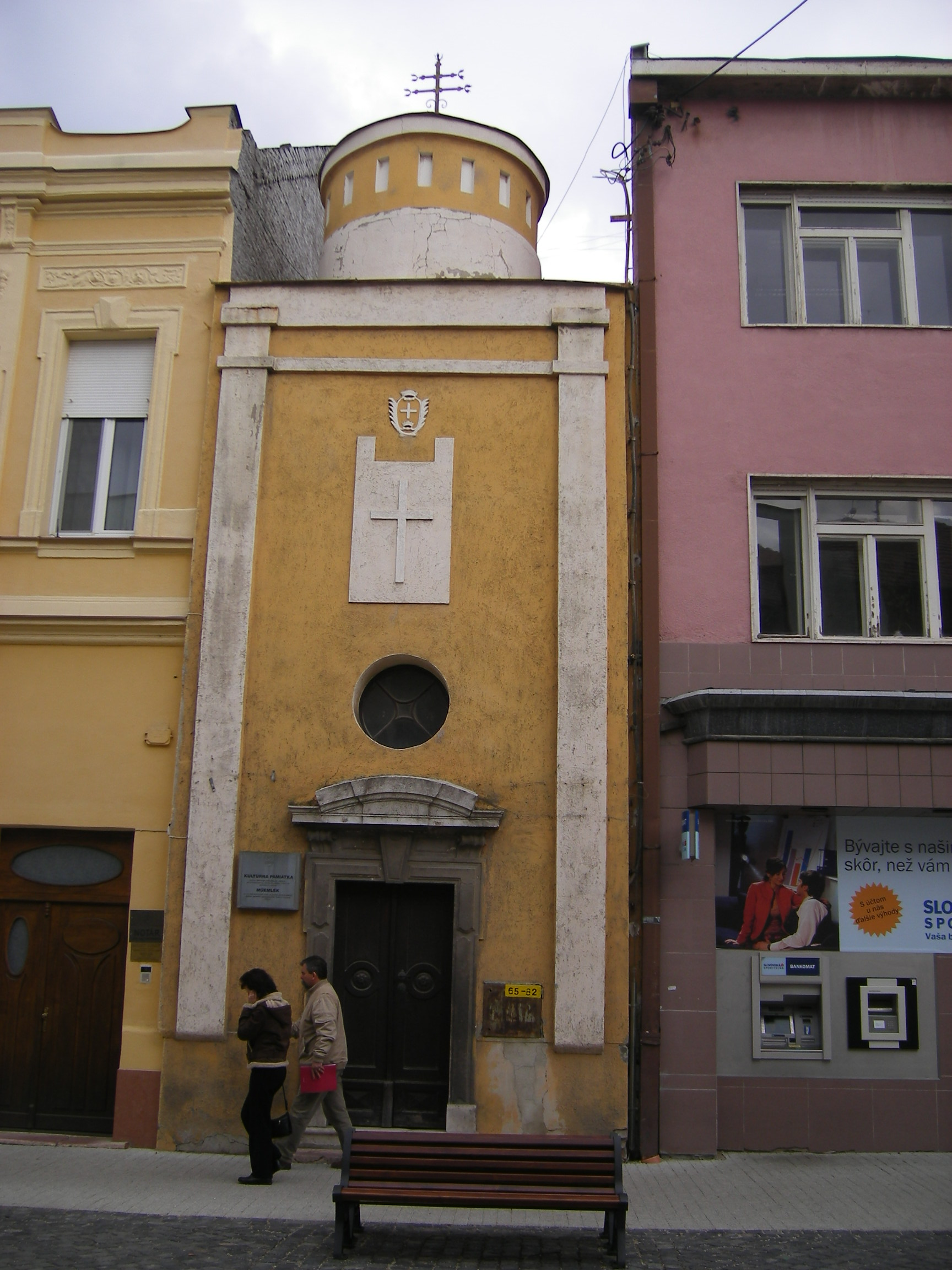 Komárom - A Szt. József-kápolna a Nádor-utcábanSlovenčina: Kaplnka sv. Jozefa v Komárne